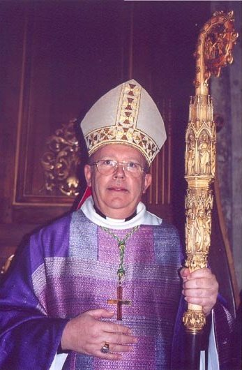 Monseigneur Ricard avec la crosse des archevêques de Bordeaux lors de la célébration d'accueil à l'occasion de son arrivée dans le diocèse.